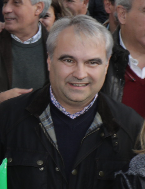 Concentración en apoyo de un tren digo para Extremadura.